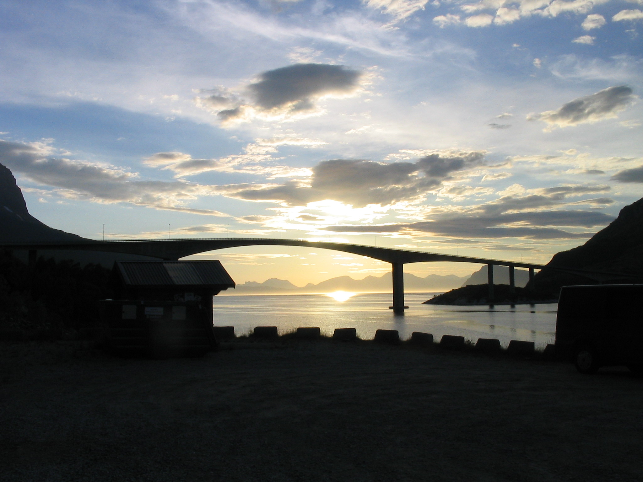 Mjøsundbrua (bridge) in Ibestad and Salangen, Norway